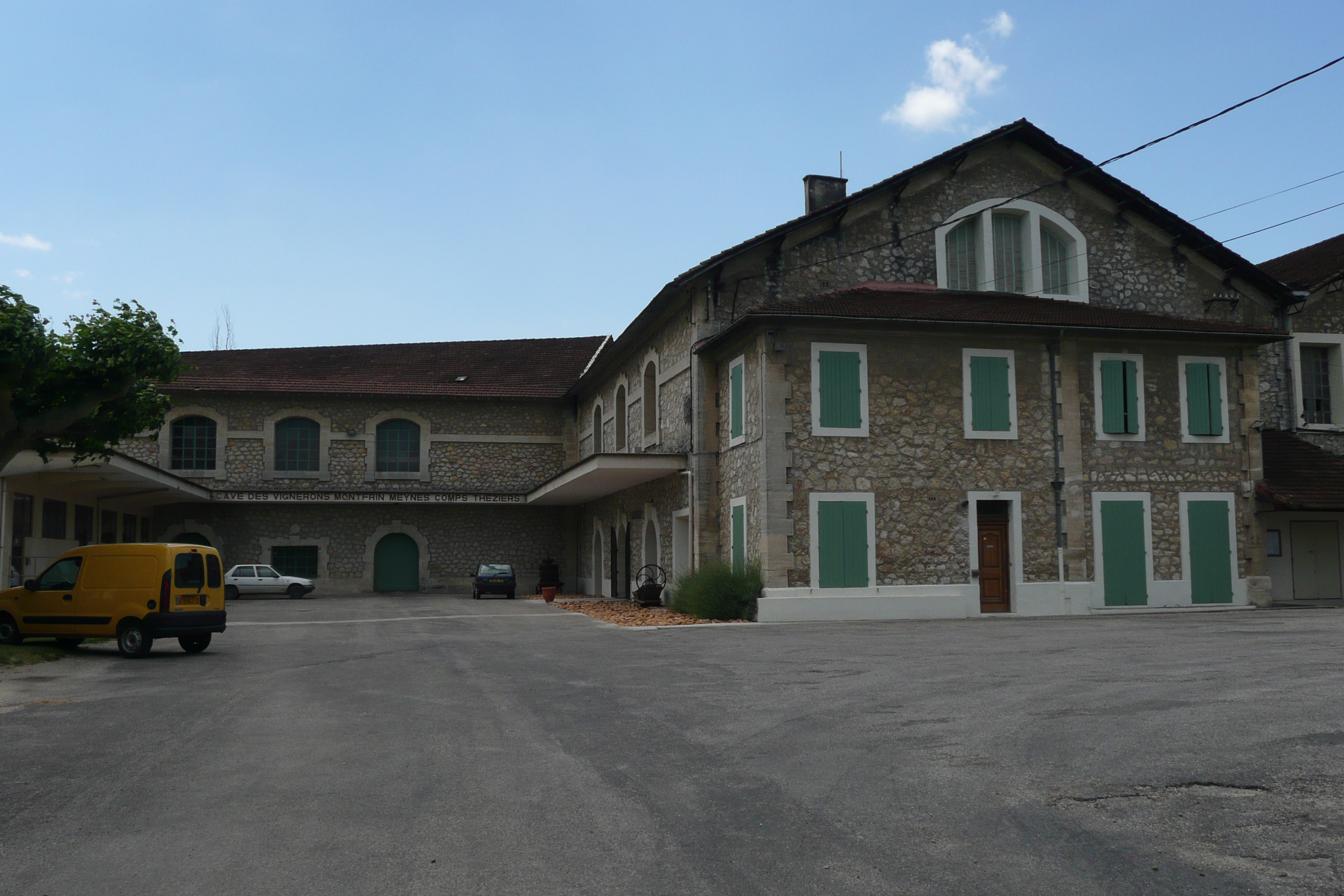 Cave coopérative près de Meynes.